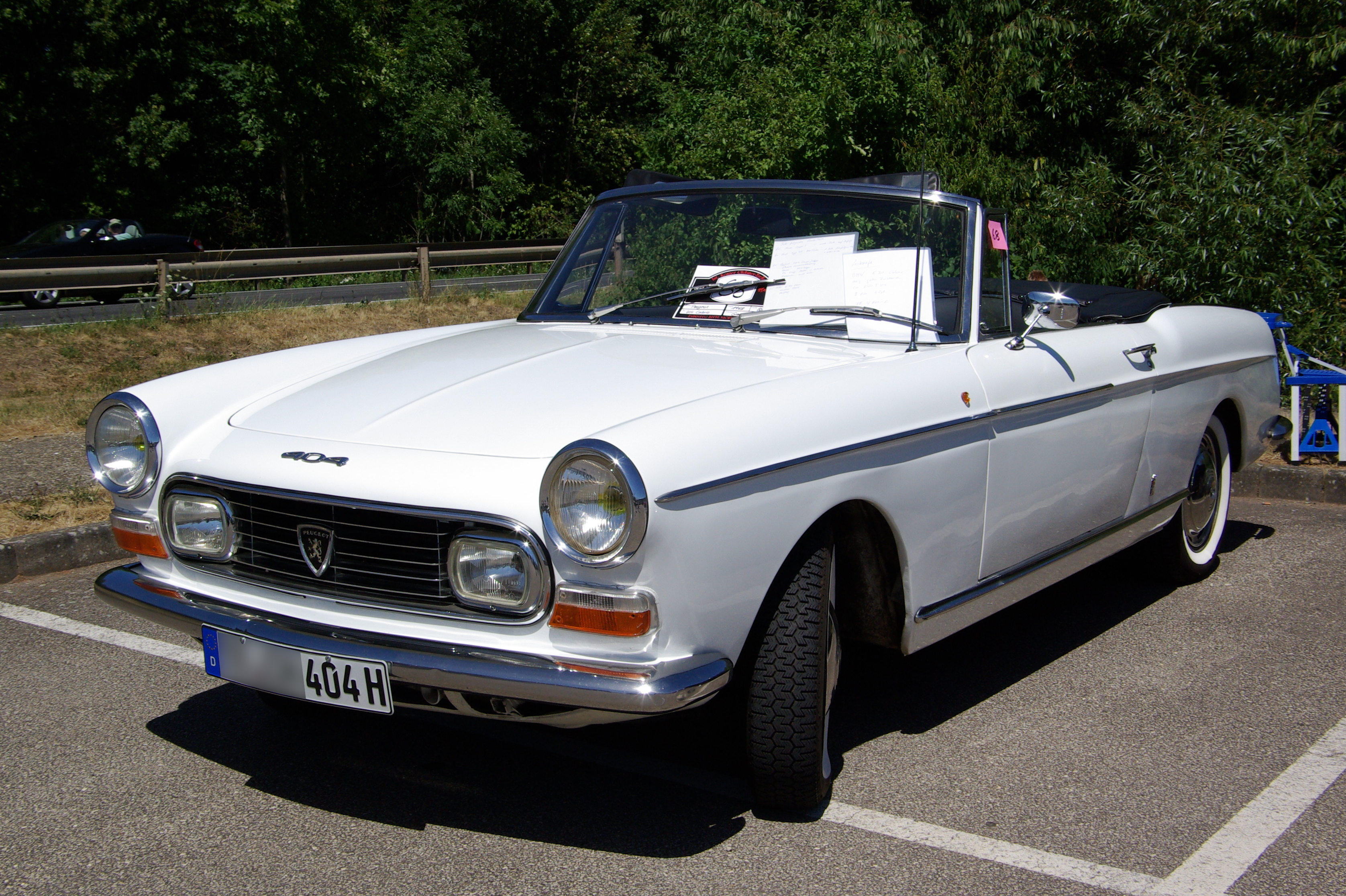 Peugeot 404 Cabrio, Baujahr 1968, 88 PS aufgenommen bei / photographed at "Internationales Konzer Oldtimer-Treffen", 18. Juli 2010